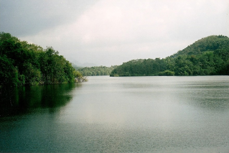 പെരുവണ്ണാമുഴി അണക്കെട്ടിൽ ജലം നിറഞ്ഞപ്പോൾ